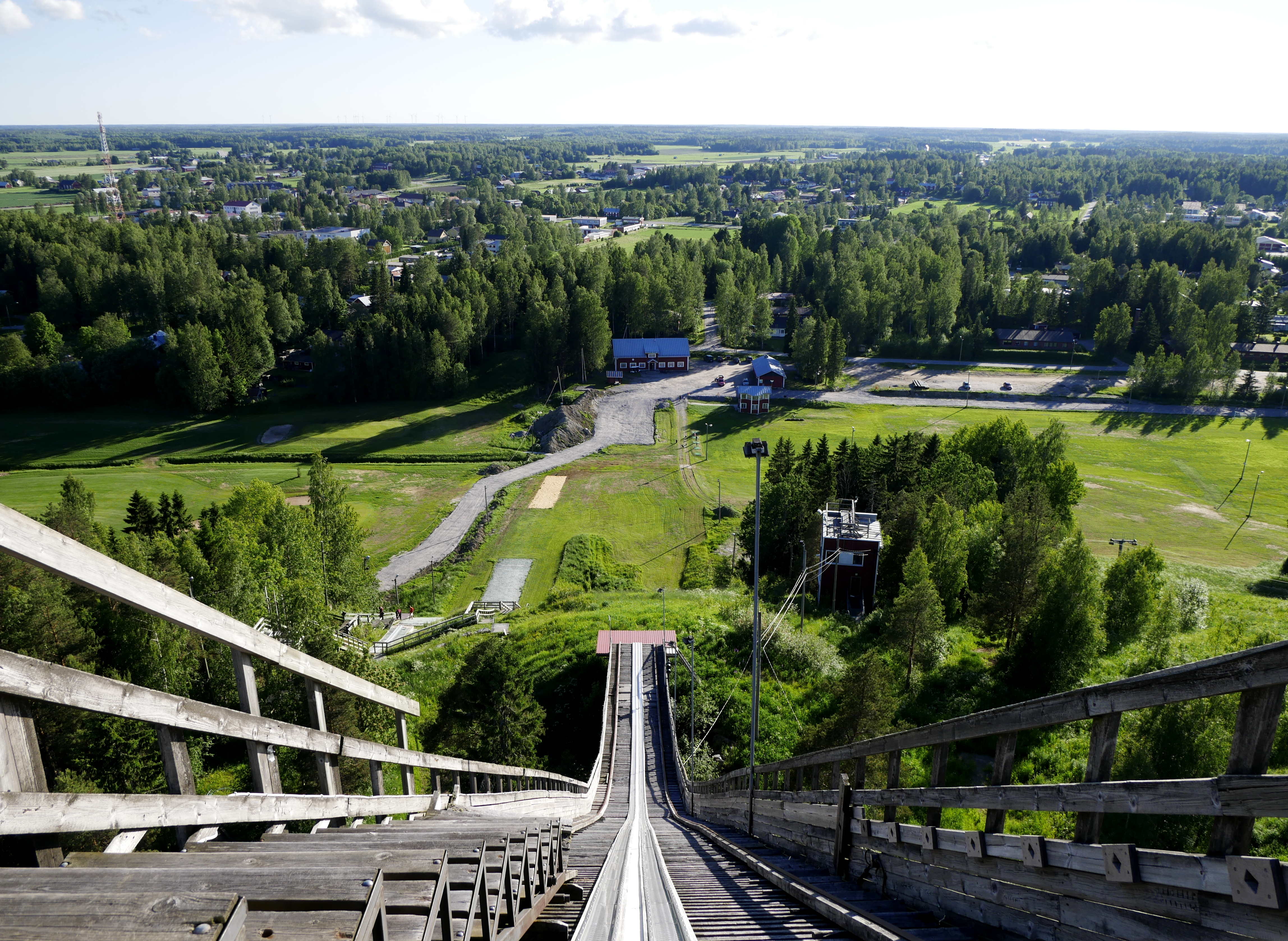 Näkymä Vöyrin mäkihyppytornista.